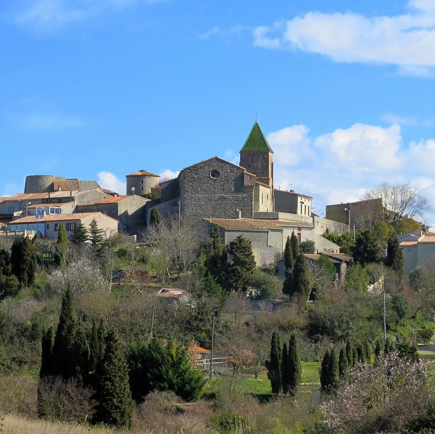 Cailhau